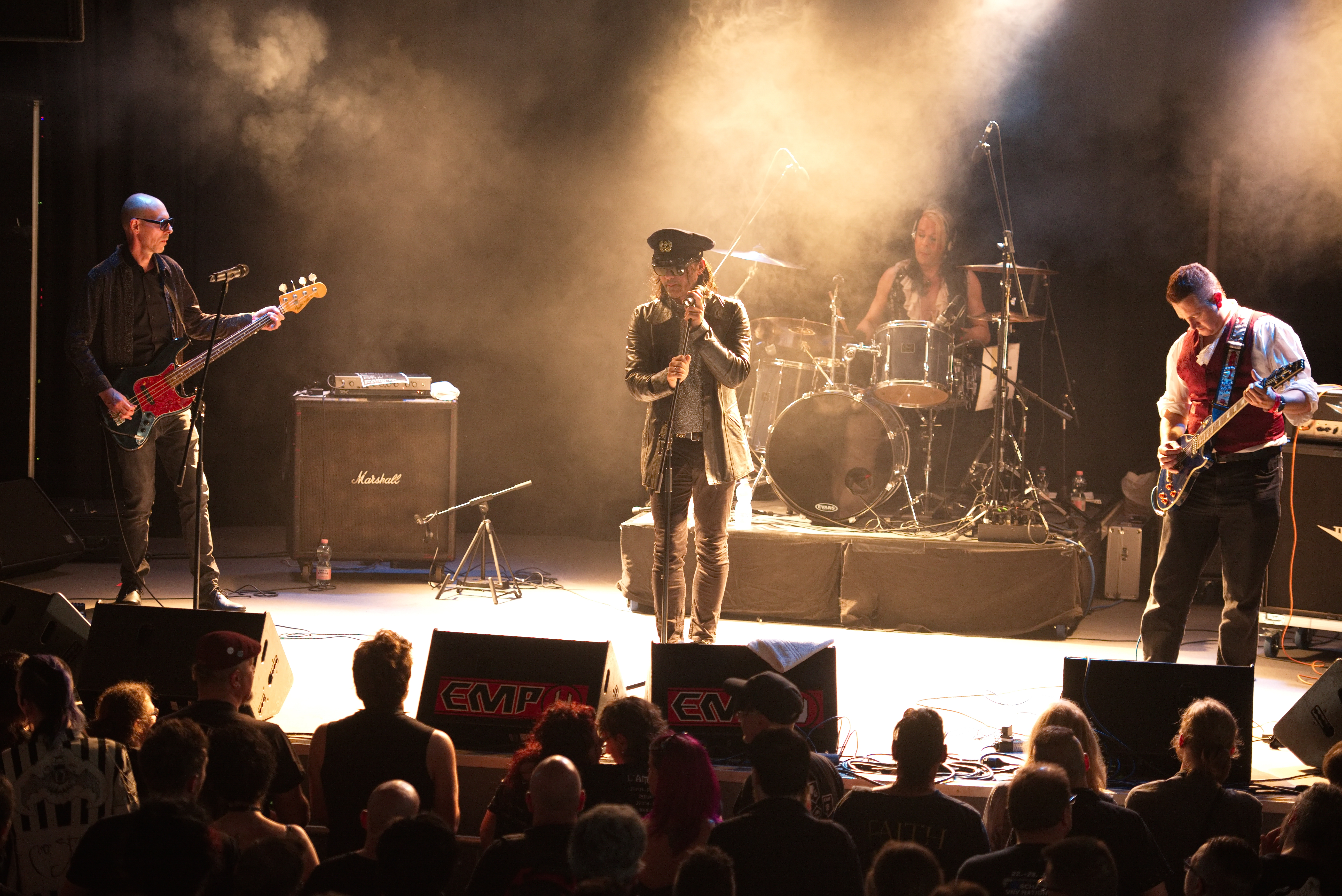 Nosferatu, Amphi festival 2016